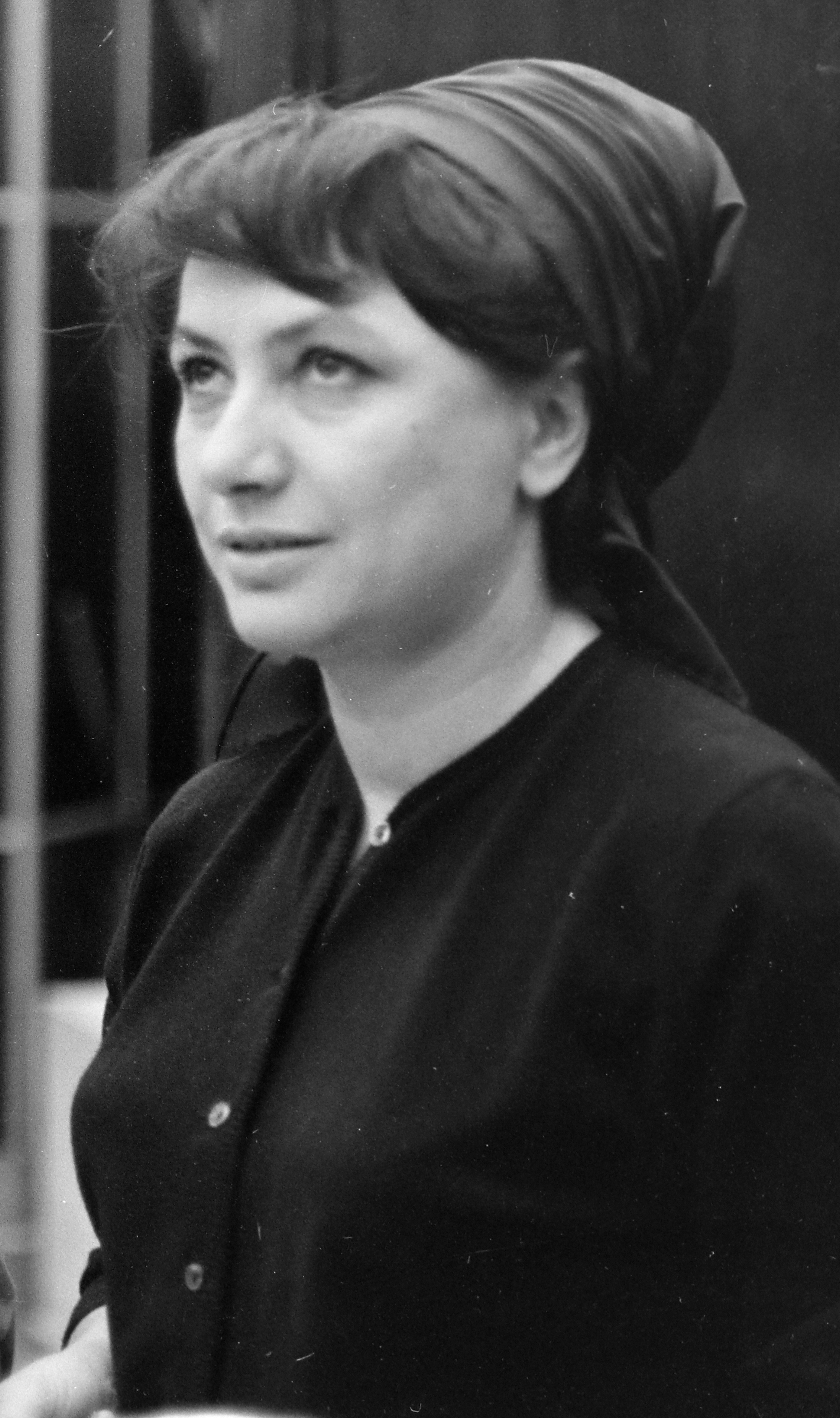 Berek Kati magyar színésznő.